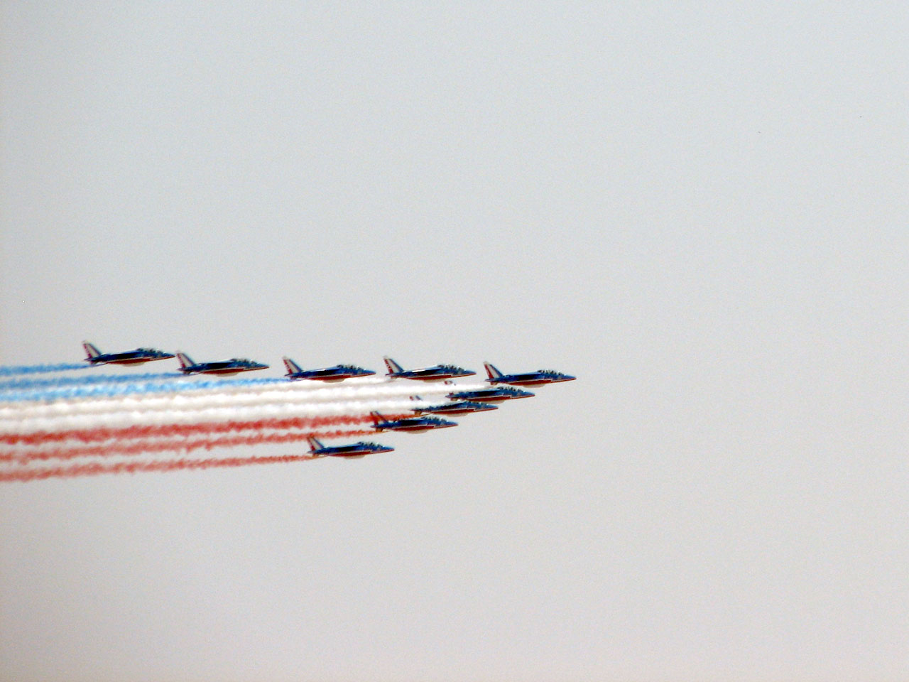 La patrouille de France ouvrant le défilé du 14/7/2006